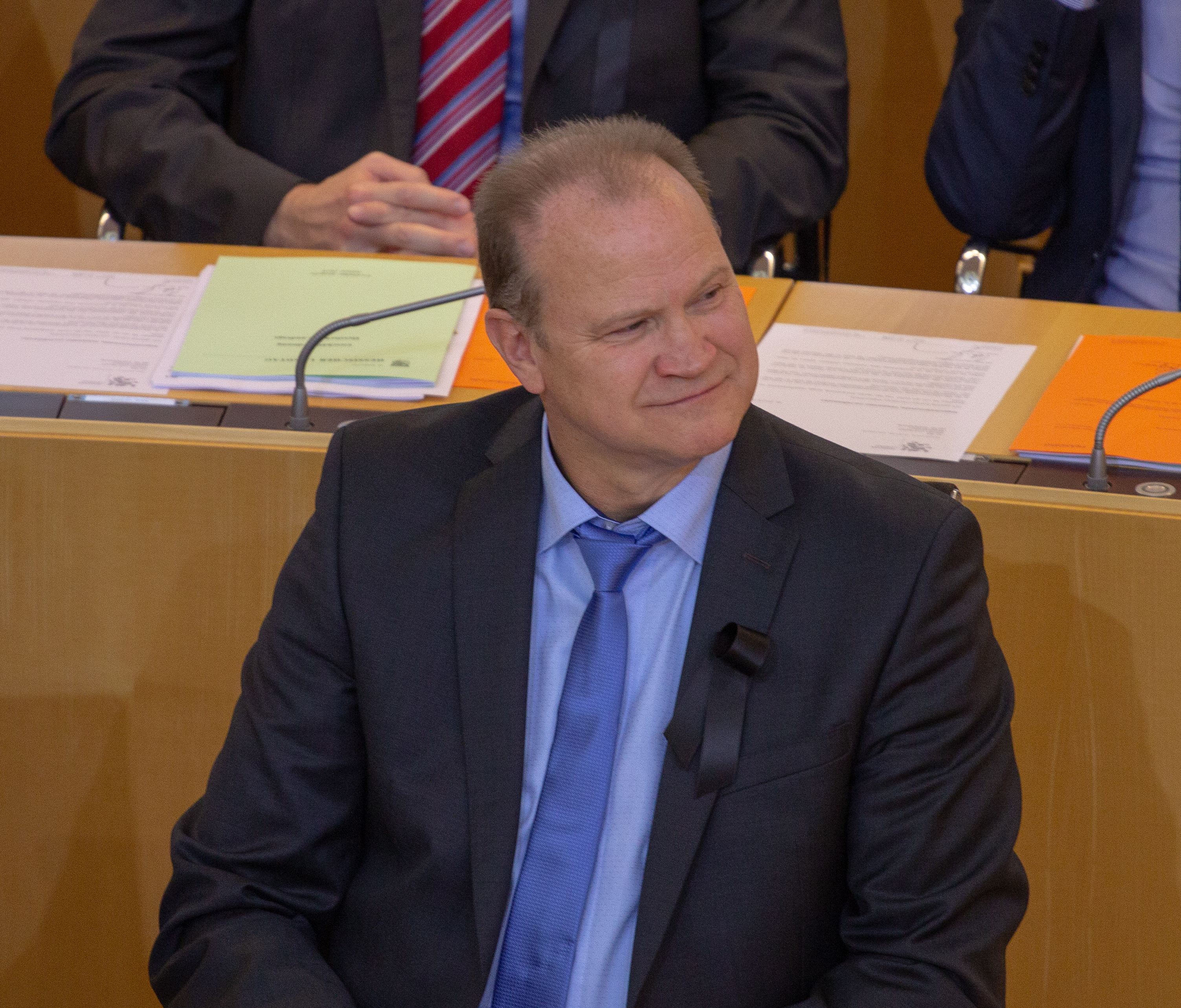 Konstituierende Sitzung des Hessischen Landtages am 18. Januar 2019 in Wiesbaden.